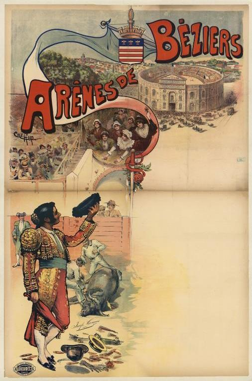 Arênes de Béziers, Impr. Camis (Paris).